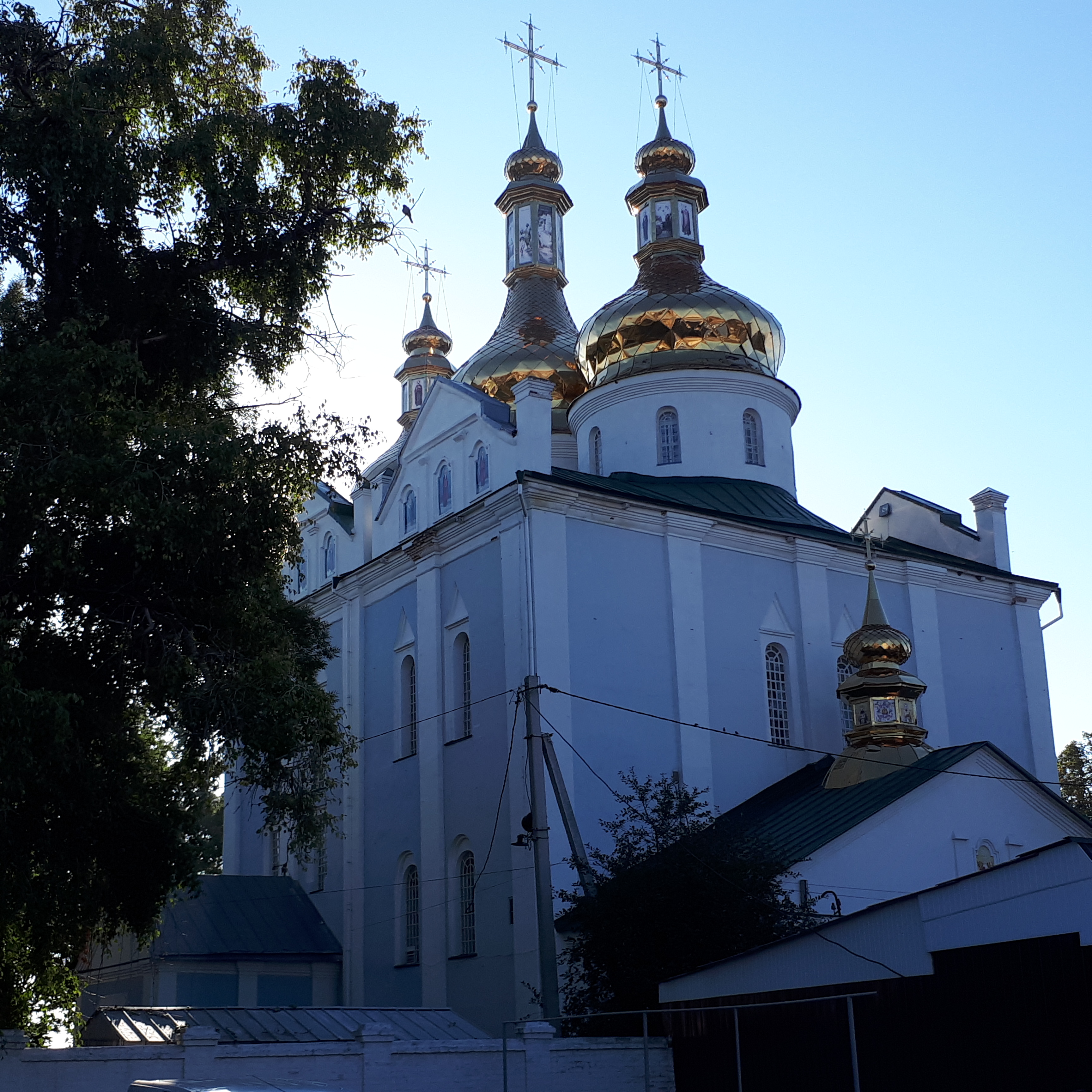 Святодухівський собор (мур.), Ромни, пл. Базарна, 17